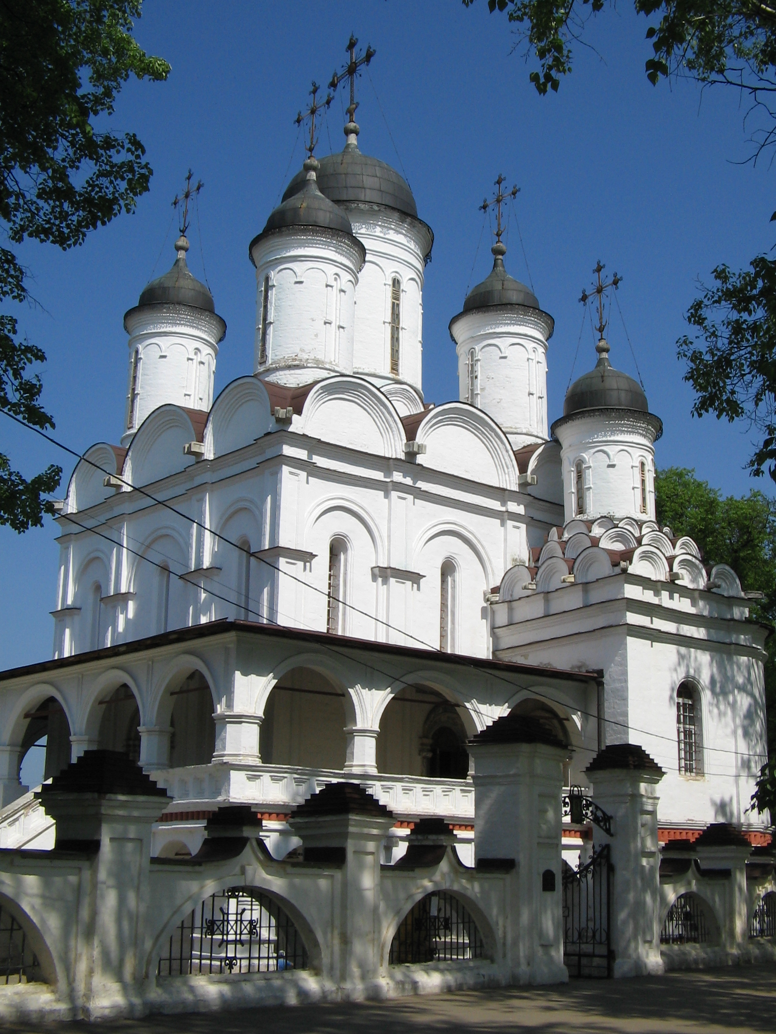 Собственный фотоархив.